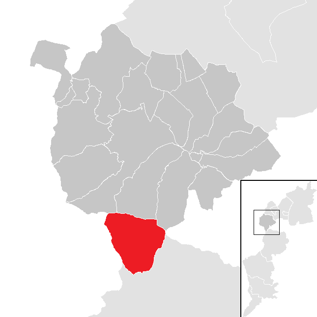 Bezirk Mattersburg